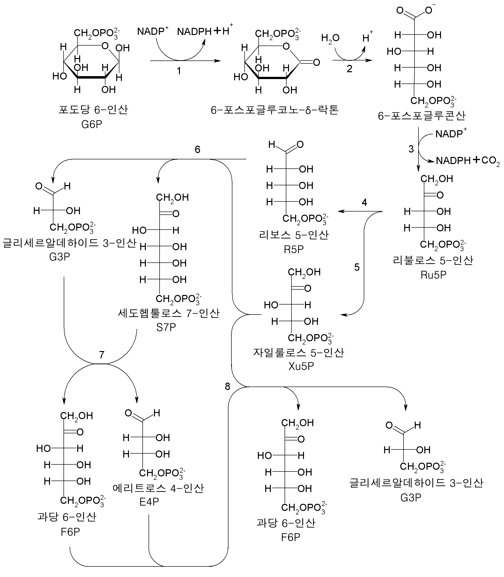 오탄당 인산 경로의 그림